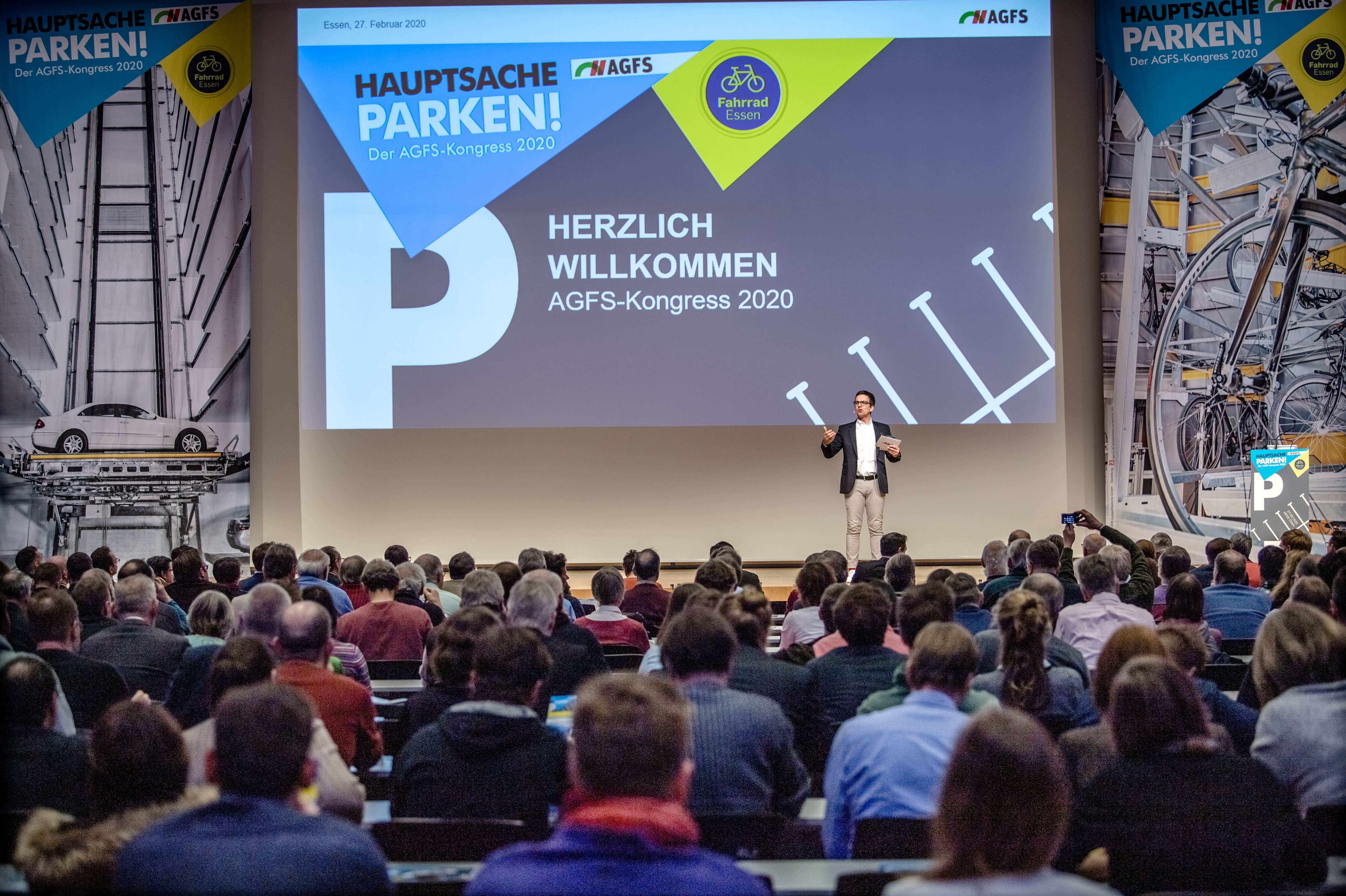 AGFS Kongress 2020: Hauptsache Parken